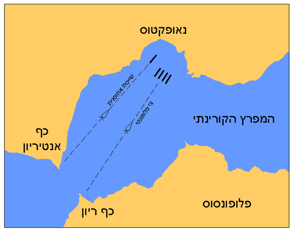 זירת קרב נאופקטוס, 429 לפנה"ס